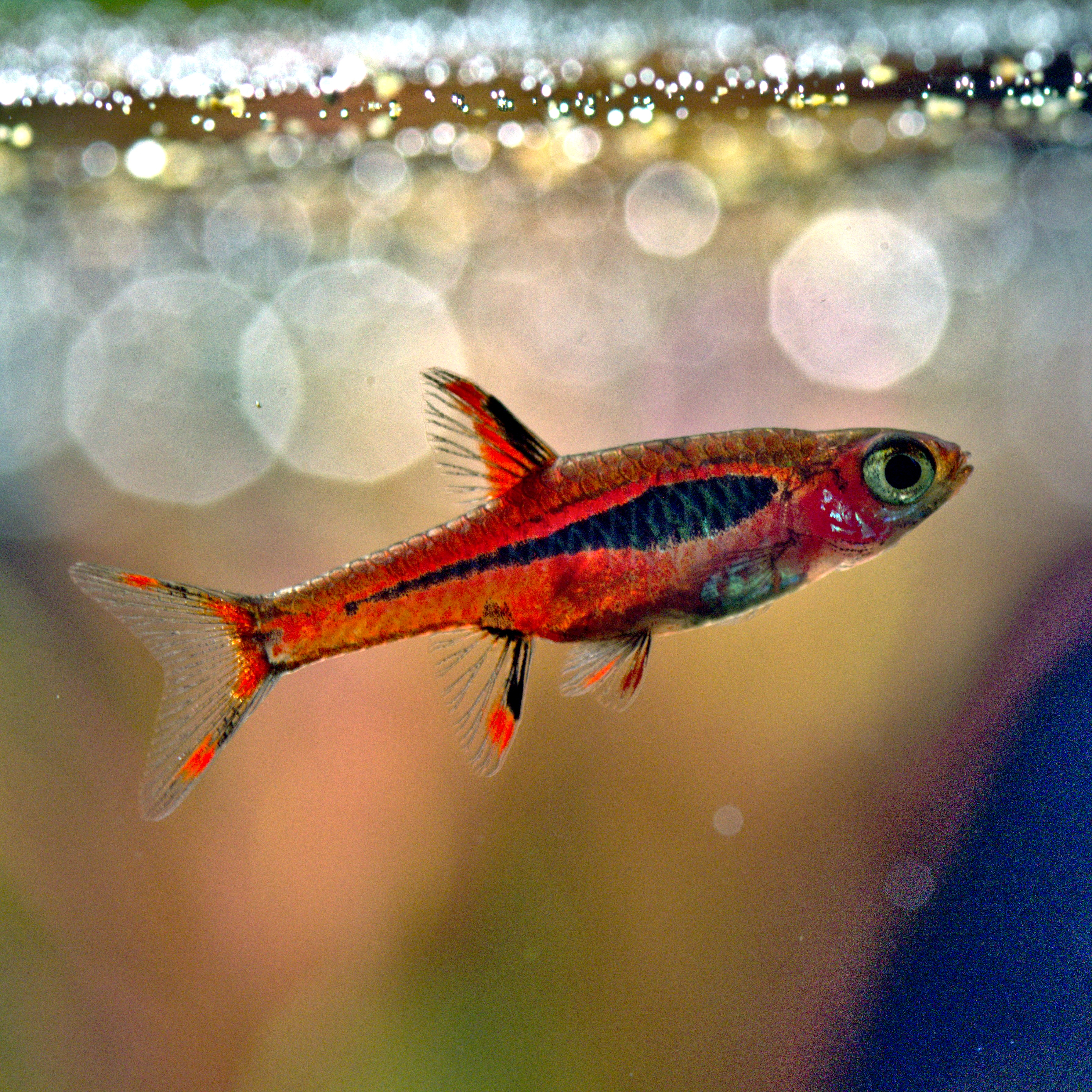 Male Boraras Brigittae in Aquarium.